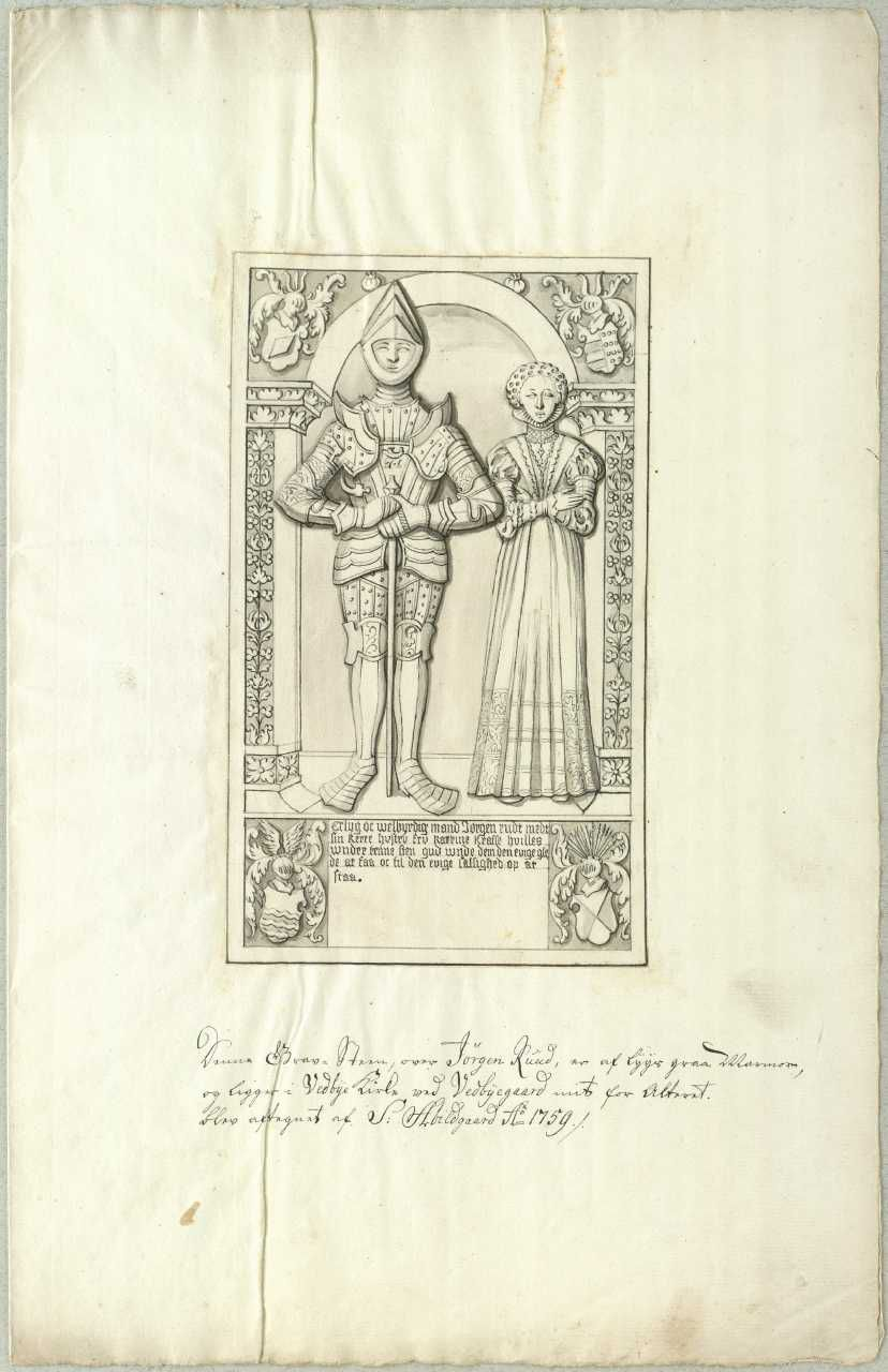 96. Gravsten, 1557. Jørgen Rud og hustru Karen Krafse. Denne Grav-Steen over Jørgen Ruud, er af lys graa Marmor, og ligger i Vedbye Kirke ved Veedbyegaard, mit for Alteret. blev aftegnet af S: Abildgaard Ao 1759. 24 x 38 cm.